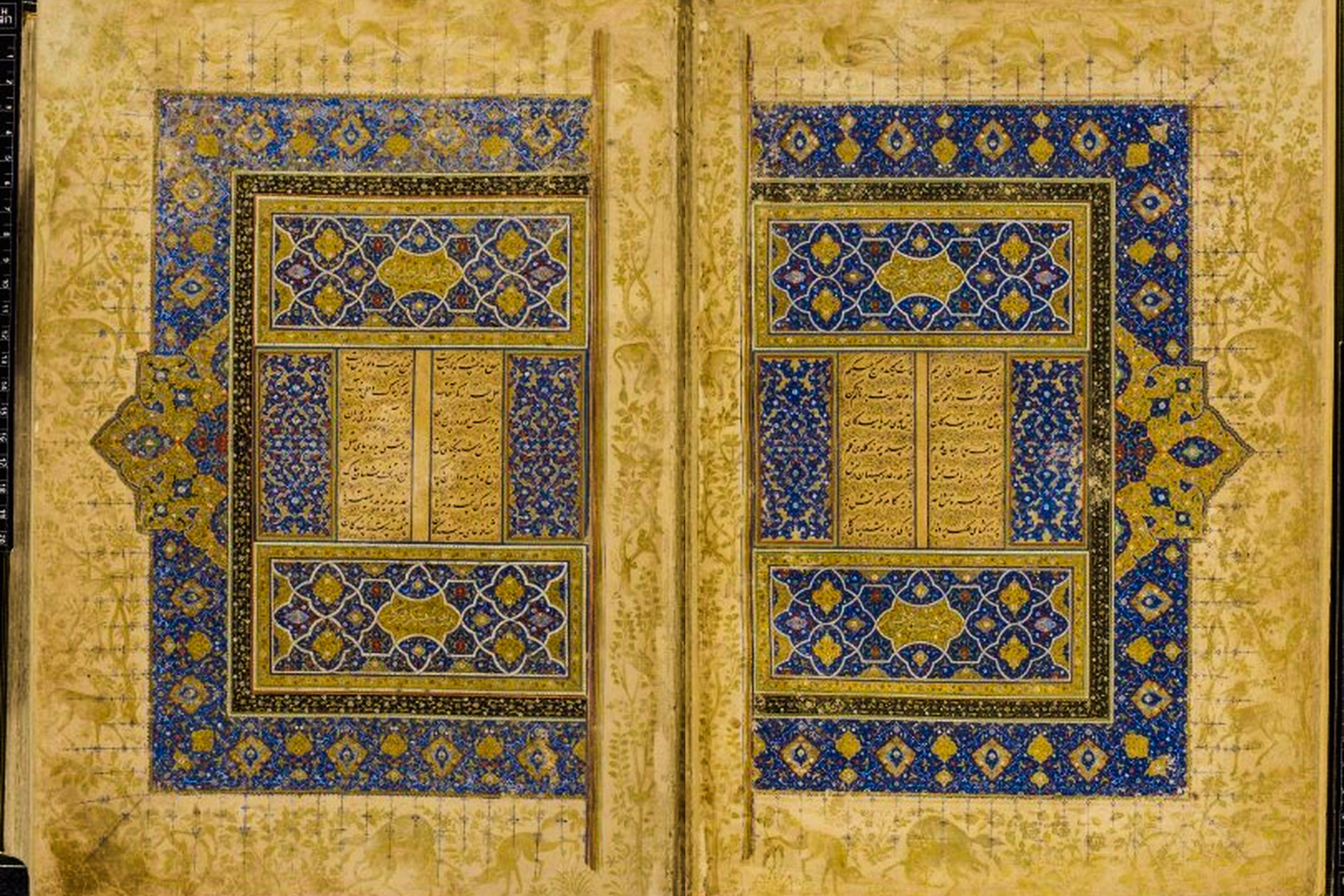 Şah I Təhmasibin Xəmsə əlyazmasının titul səhifəsi